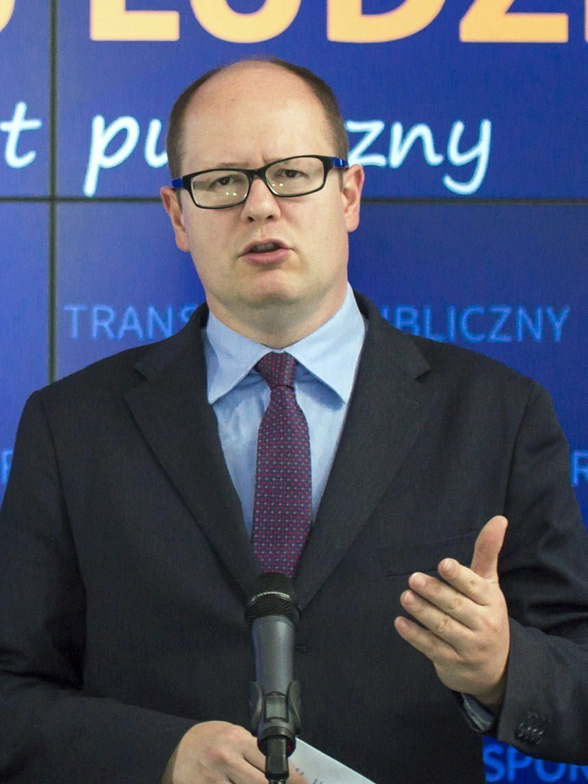 Paweł Adamowicz. Konferencja BLIŻEJ LUDZI: transport publiczny (04.11.2014).